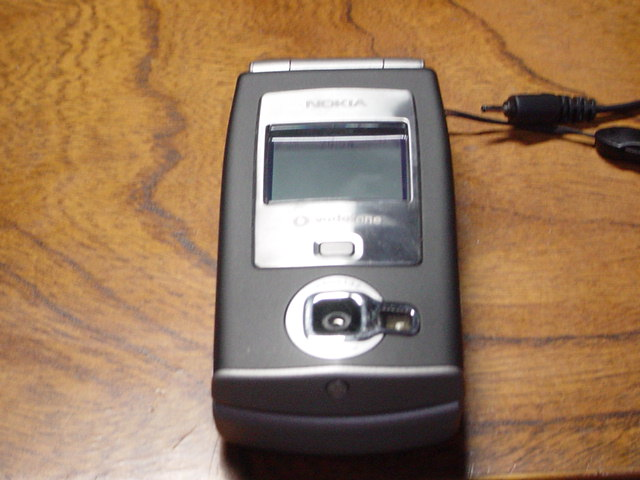 Vodafone(SoftBank)804NK型携帯電話。収納（折畳）時の状態。尚、写真の機械は投稿者（D.Bellwood)所有の機器であることを特に記述します。